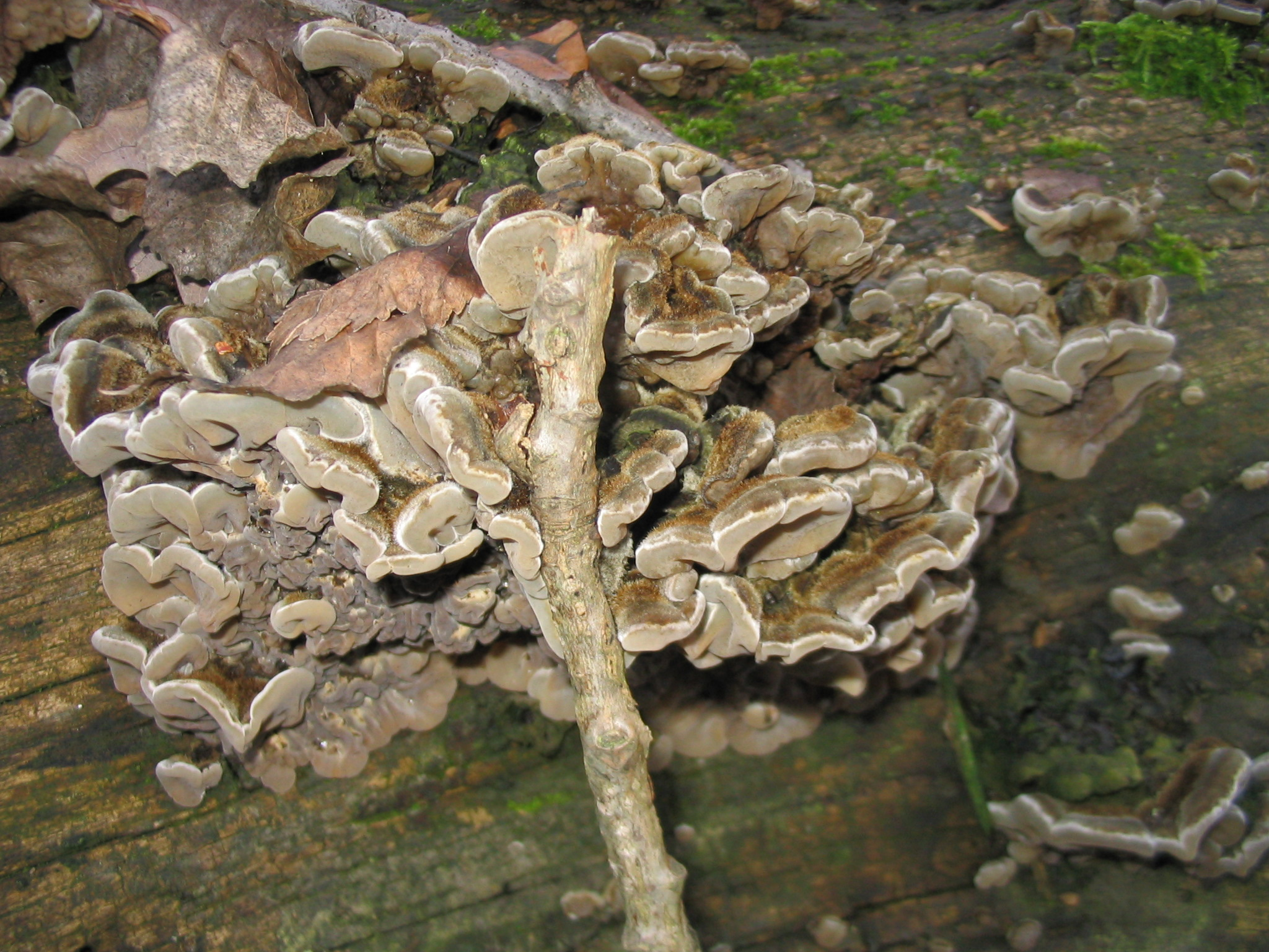 Gezonter Ohrlappenpilz, Auricularia mesenterica, fotografiert von Dr. Hagen Graebner am 29.12.2003, Fundort: Rheinauen bei Ingelheim